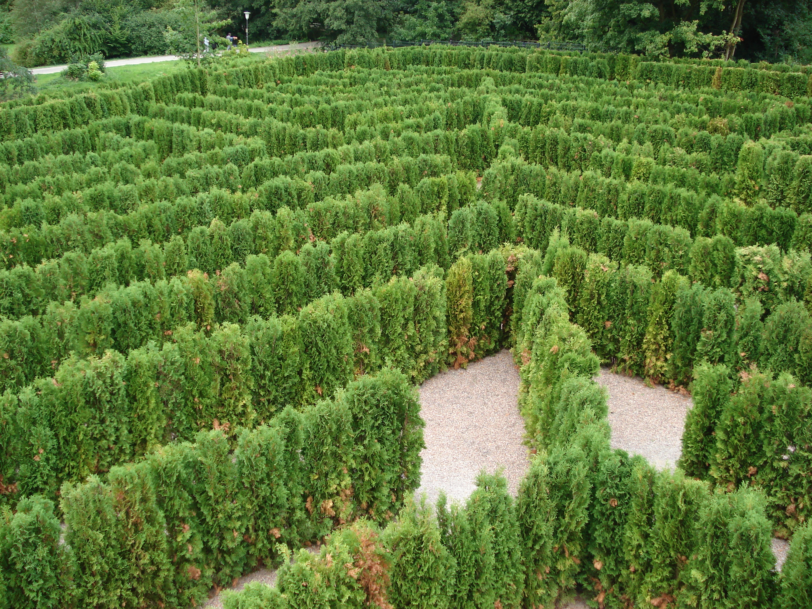 Hortus Vitalis: Geländeüberblick